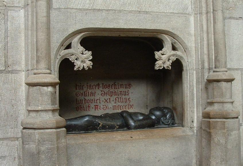 eigen foto 25/08/04